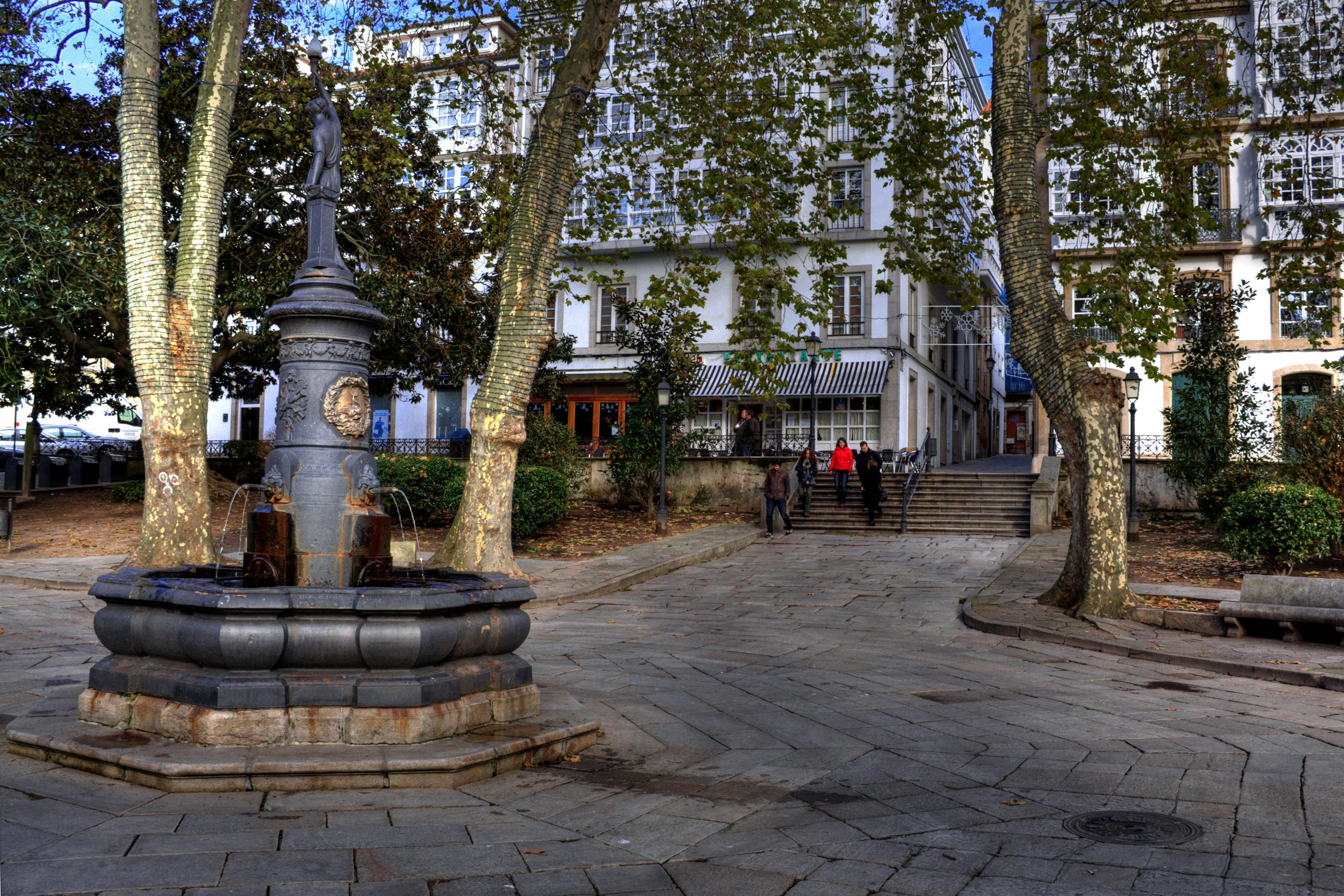 A Coruña, La Ciudad Vieja - La Fuente del Deseo en la plaza de Azcarraga